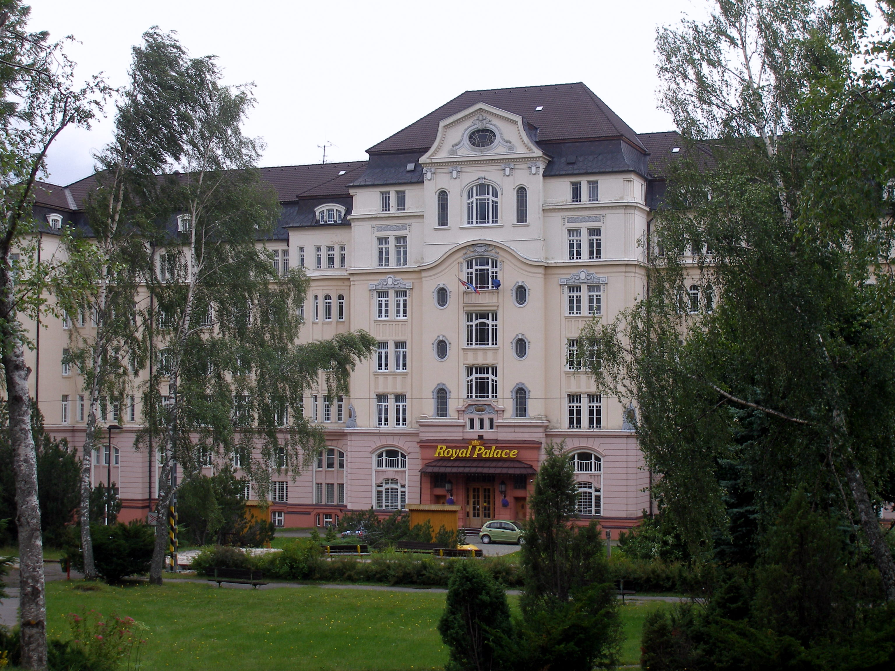 Osada Nový Smokovec This medium shows the protected monument with the number 706-1030/0 in the Slovak Republic.